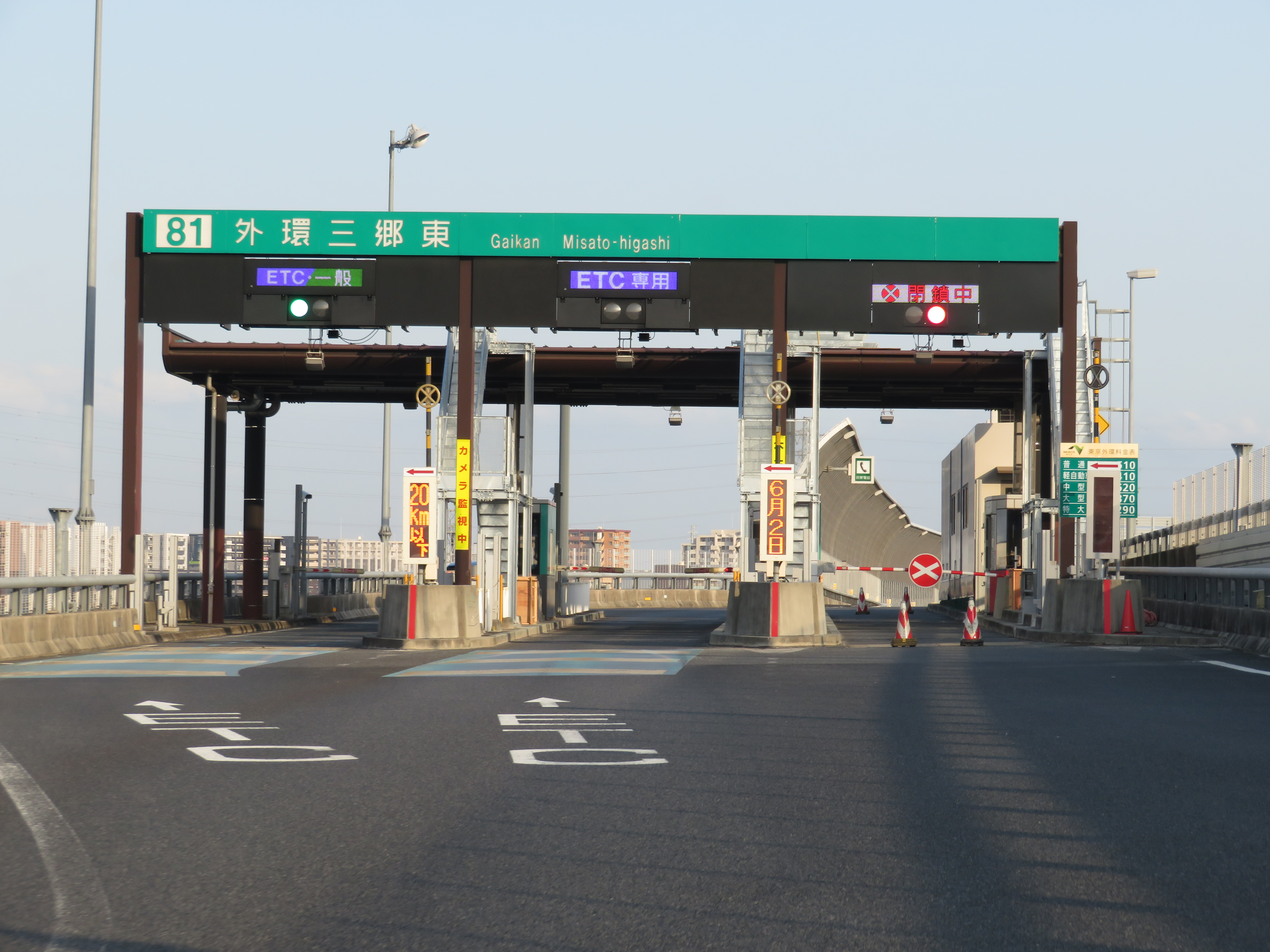 東京外環自動車道外環三郷東料金所 Canon PowerShot SX720 HS